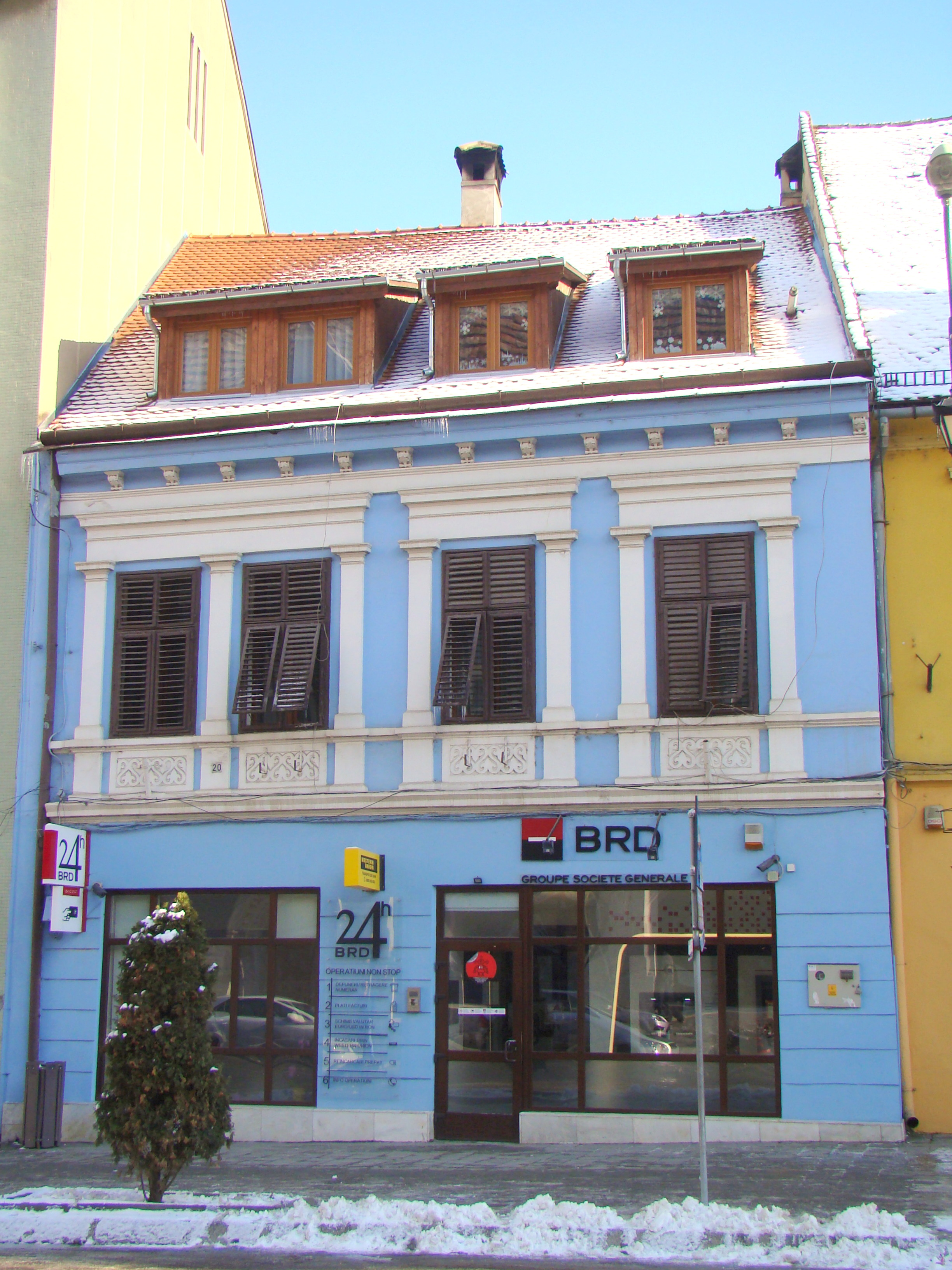 Casă, municipiul Sighișoara, Piața Oberth Hermann 20 sec. XIX